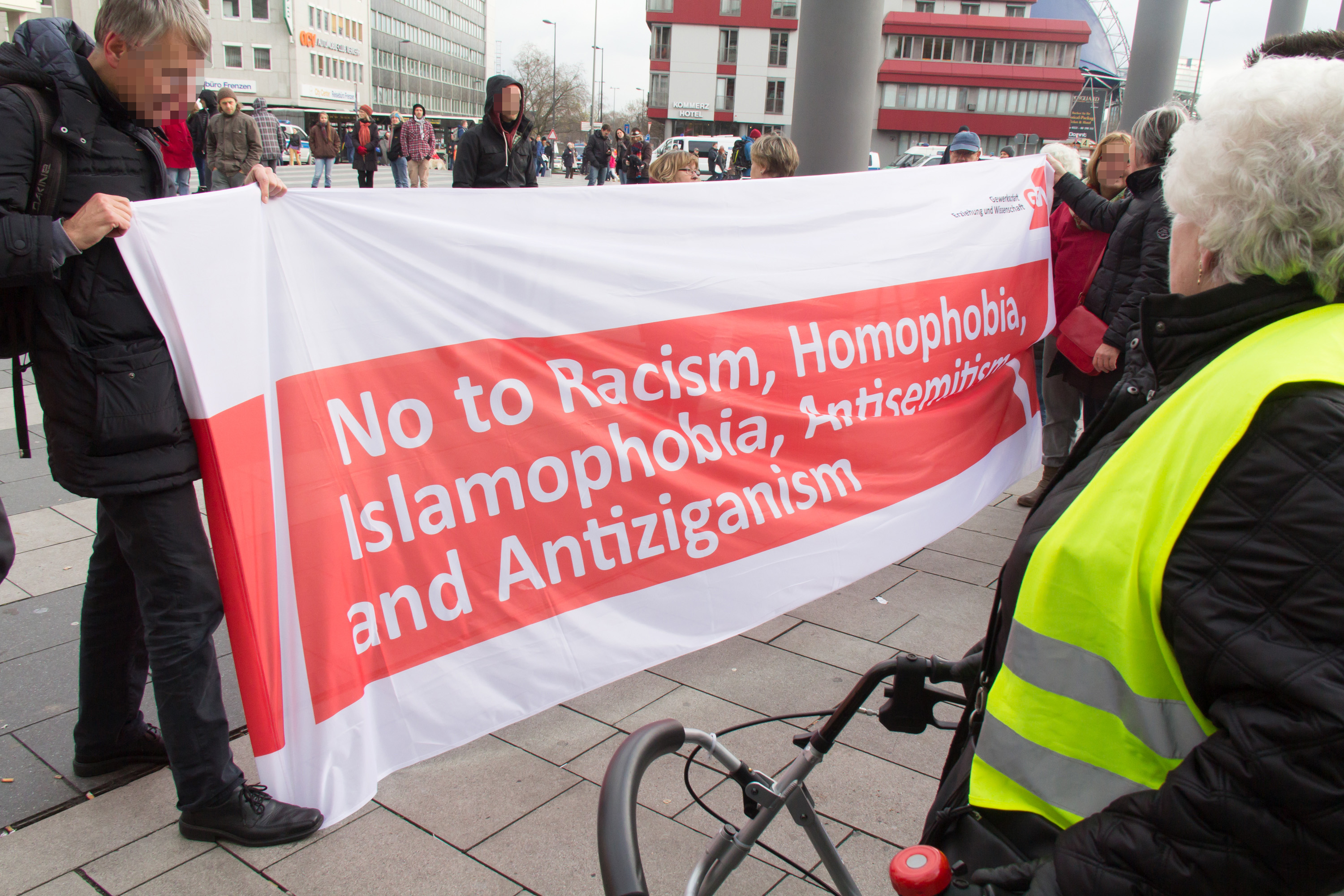 Demonstration von „Pro NRW“ und Gegendemonstration von „Köln gegen Rechts - Antifaschistisches Aktionsbündnis“ Hier: No to Racism, Homophobia, Islamophobia, Antisemitism, Antiziganism